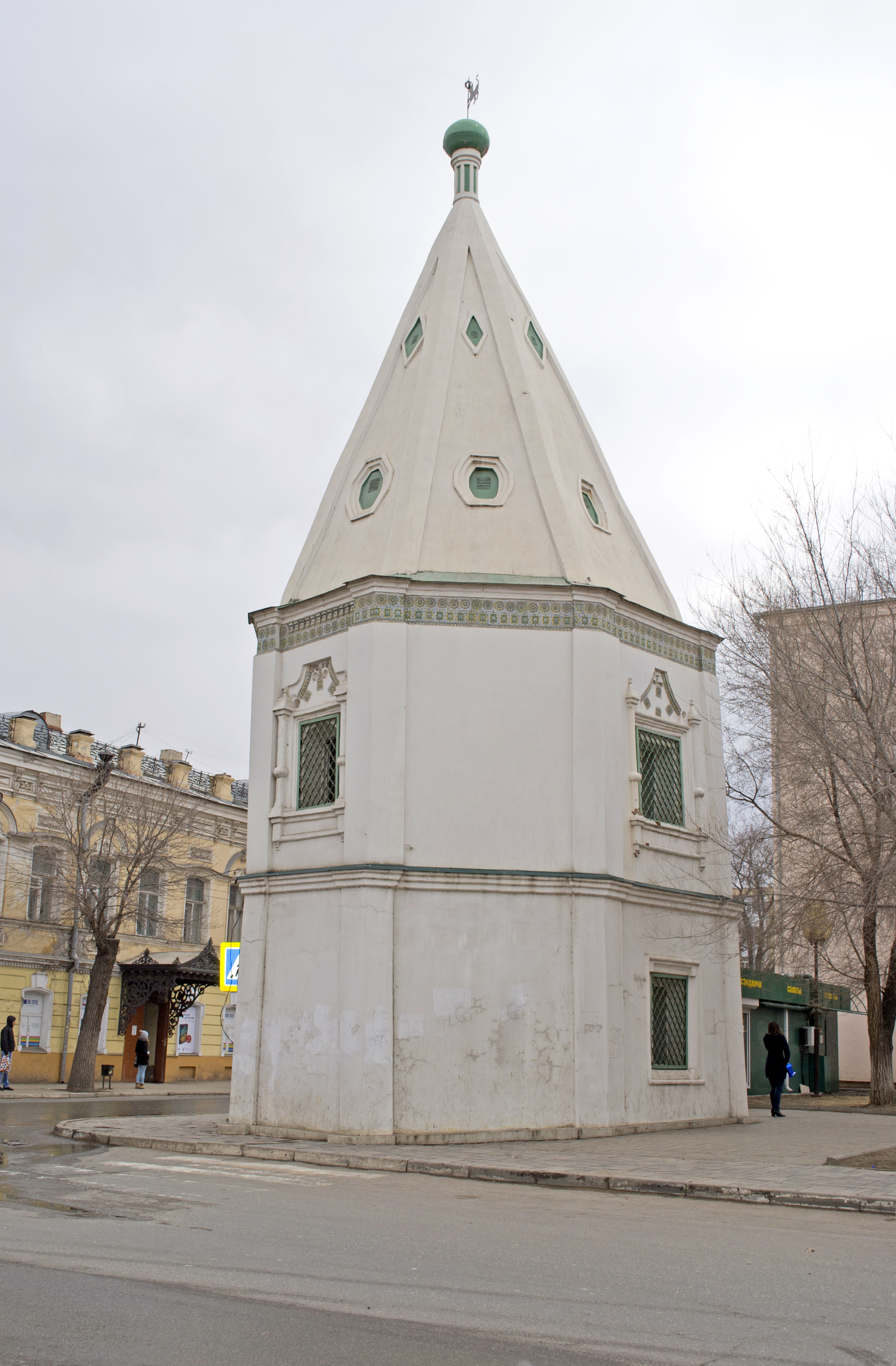 Башня, оставшаяся от Спасо-Преображенского монастыря (Астрахань)